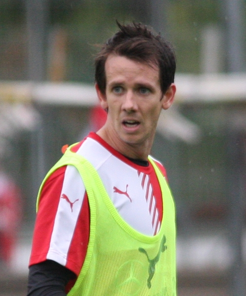 Erstes VfB-Training von Robbie Kruse. Bild von